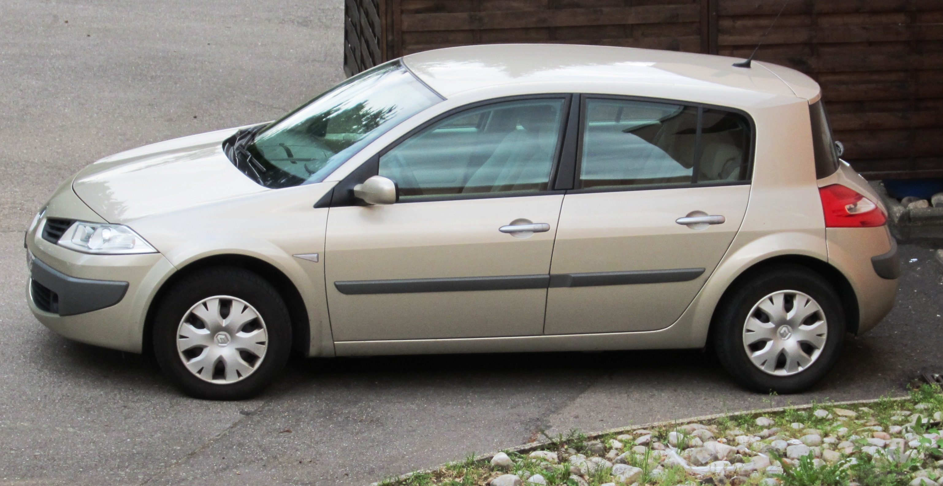 Renault Mégane II Seitenansicht in Épinal